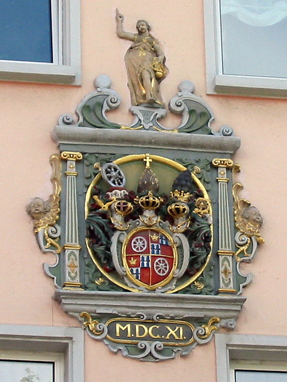 Wappenstein des ehemaligen Stadtgerichts, Spätrenaissancewappen 1611, Mainz, Höfchen 4